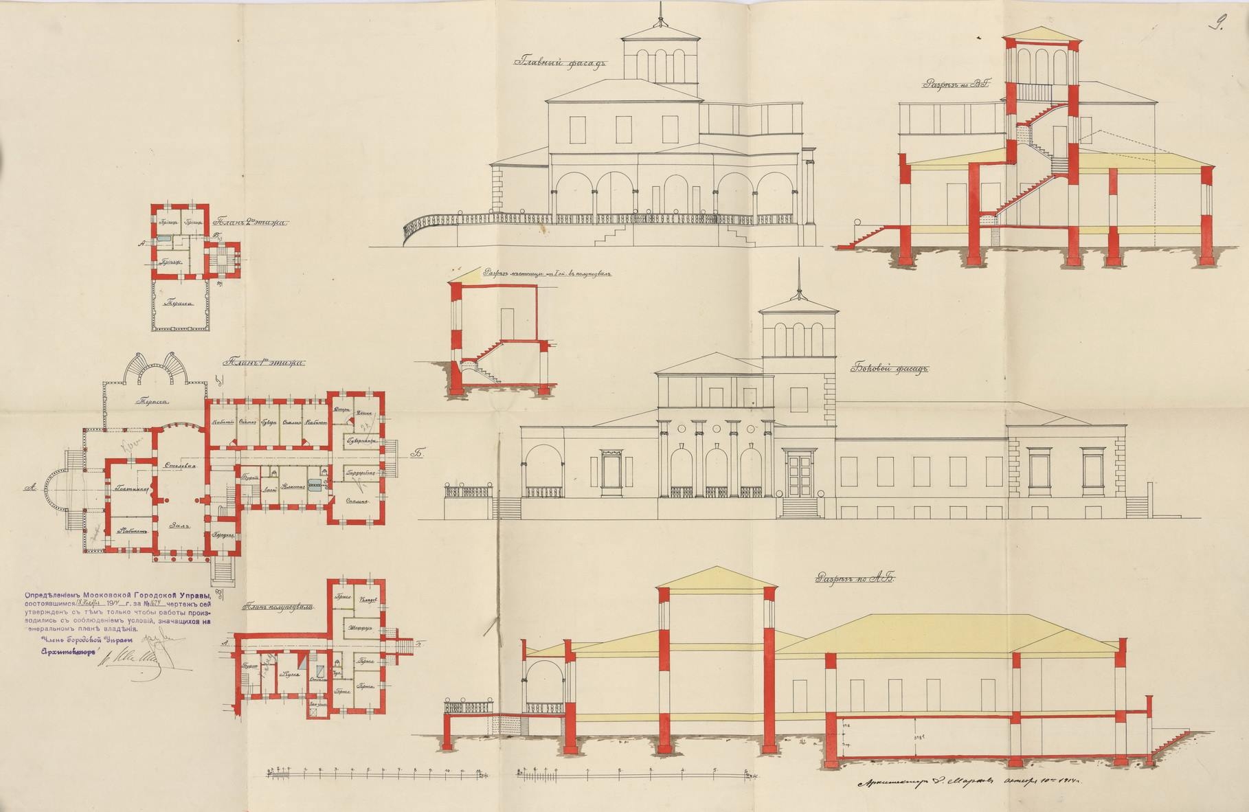 План дачи Смирнова в Сокольниках.